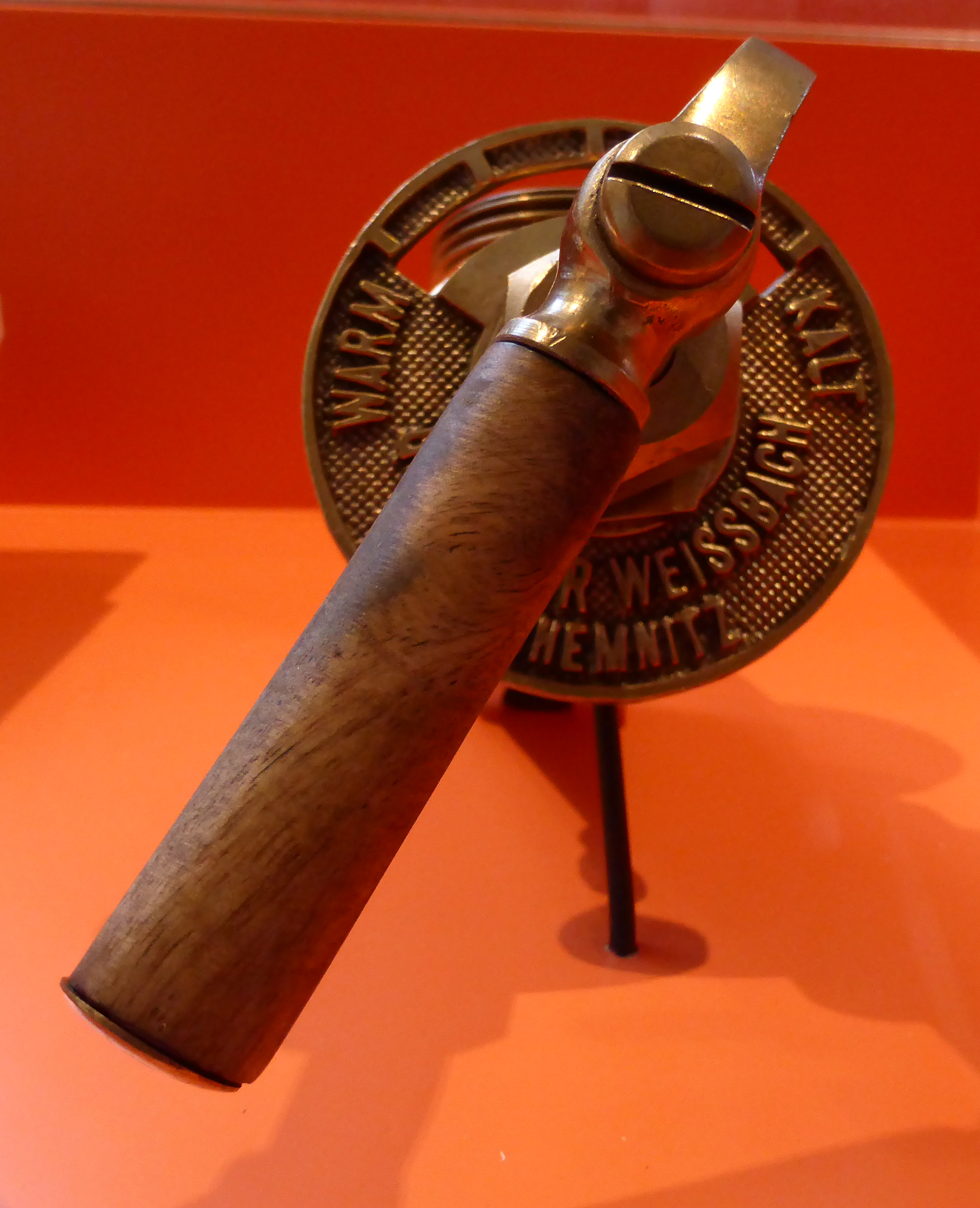 Temperaturregler für Guss-Heizkörper (Radiator) um 1910 im Deutschen Technikmuseum in Berlin. Wikipedianische KulTour am 10. Oktober 2015 in der Ausstellung des Museums.